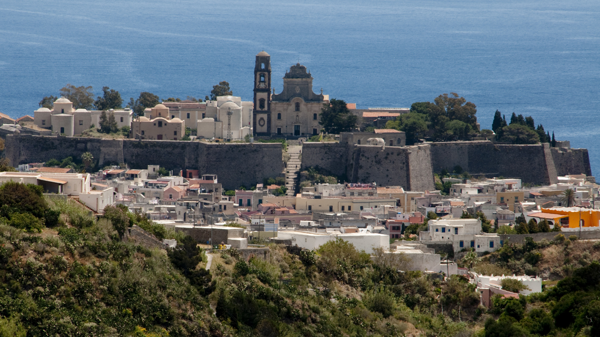 01-01-LIPARI002